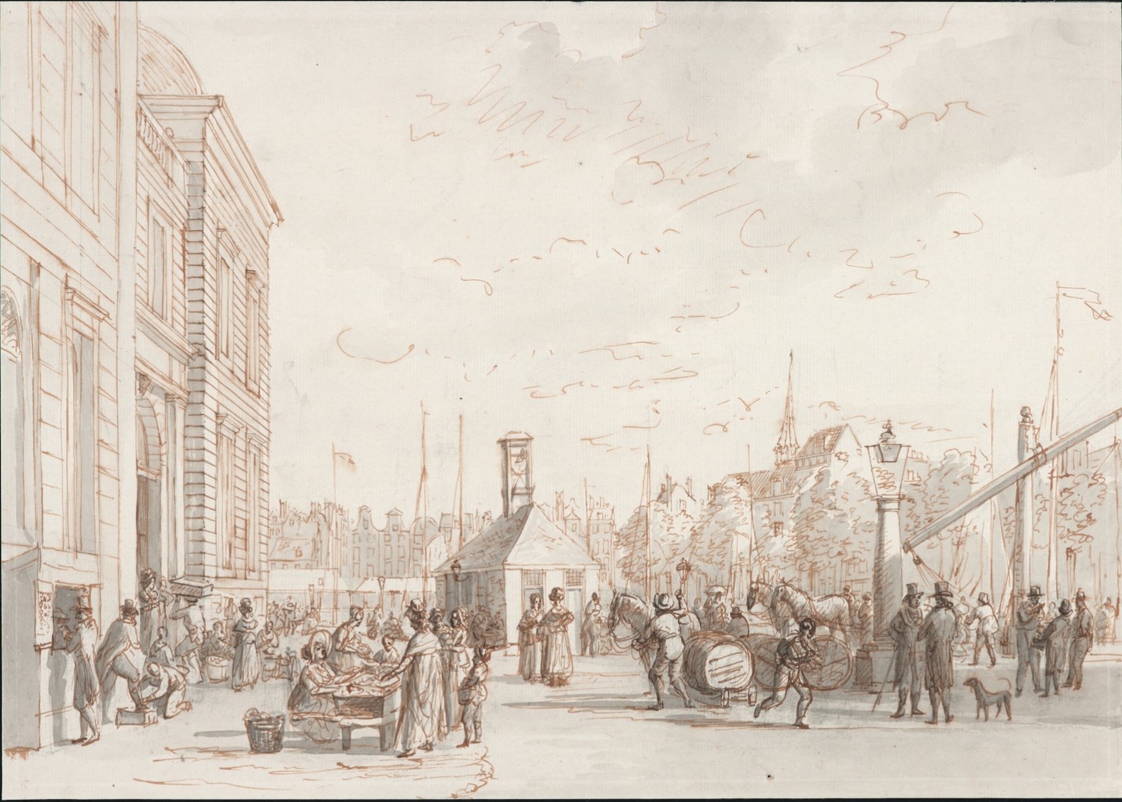 Beursplein, gezien uit zuidelijke richting vanaf de Blaak. Links de Beurs, in het midden het Haringpakkershuisje, rechts de Kolk met een kraan op de kade. Op de achtergrond huizen aan de Steigersgracht (links) en aan de Open Rijstuin (rechts). Rechts ook de spits van de Stadhuistoren. Op het Beursplein tal van figuren met uiteenlopende bezigheden.